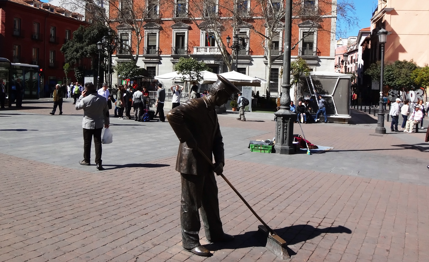 Швабрщик